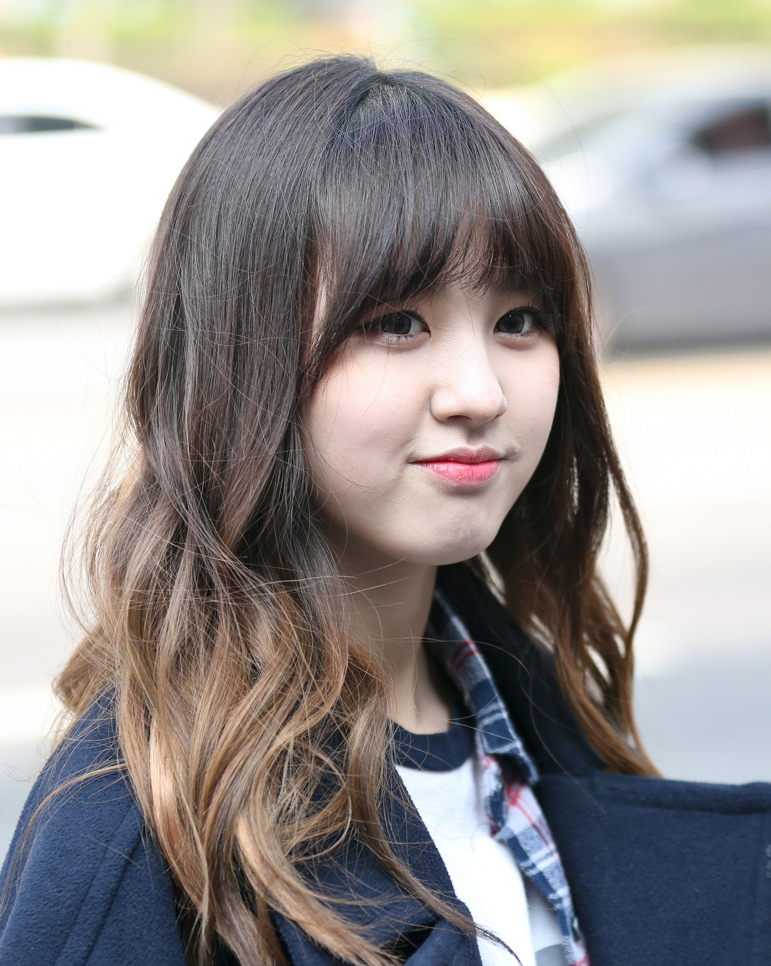 [15.03.29.] 인기가요 팬미팅 ( NC.A 앤씨아 임소은 직찍 )